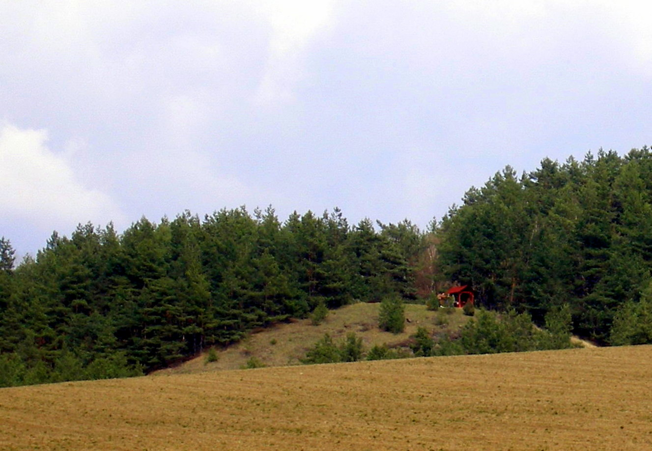 Obec Sedlice, chránené územie Dunitová skalka.